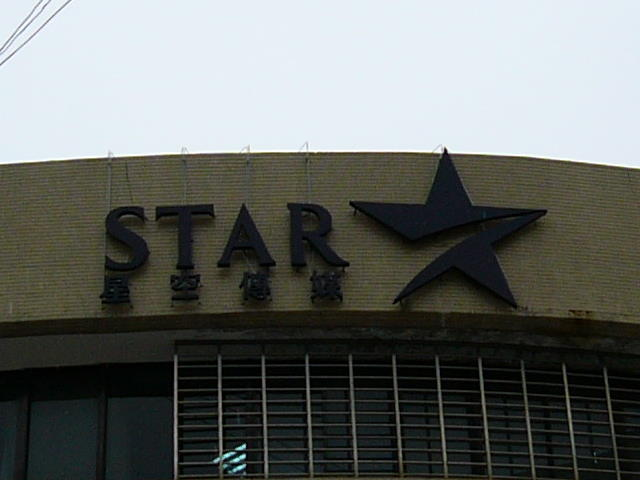 中華電視公司「UHF攝影棚及行政大樓」正面外牆上的星空傳媒標誌